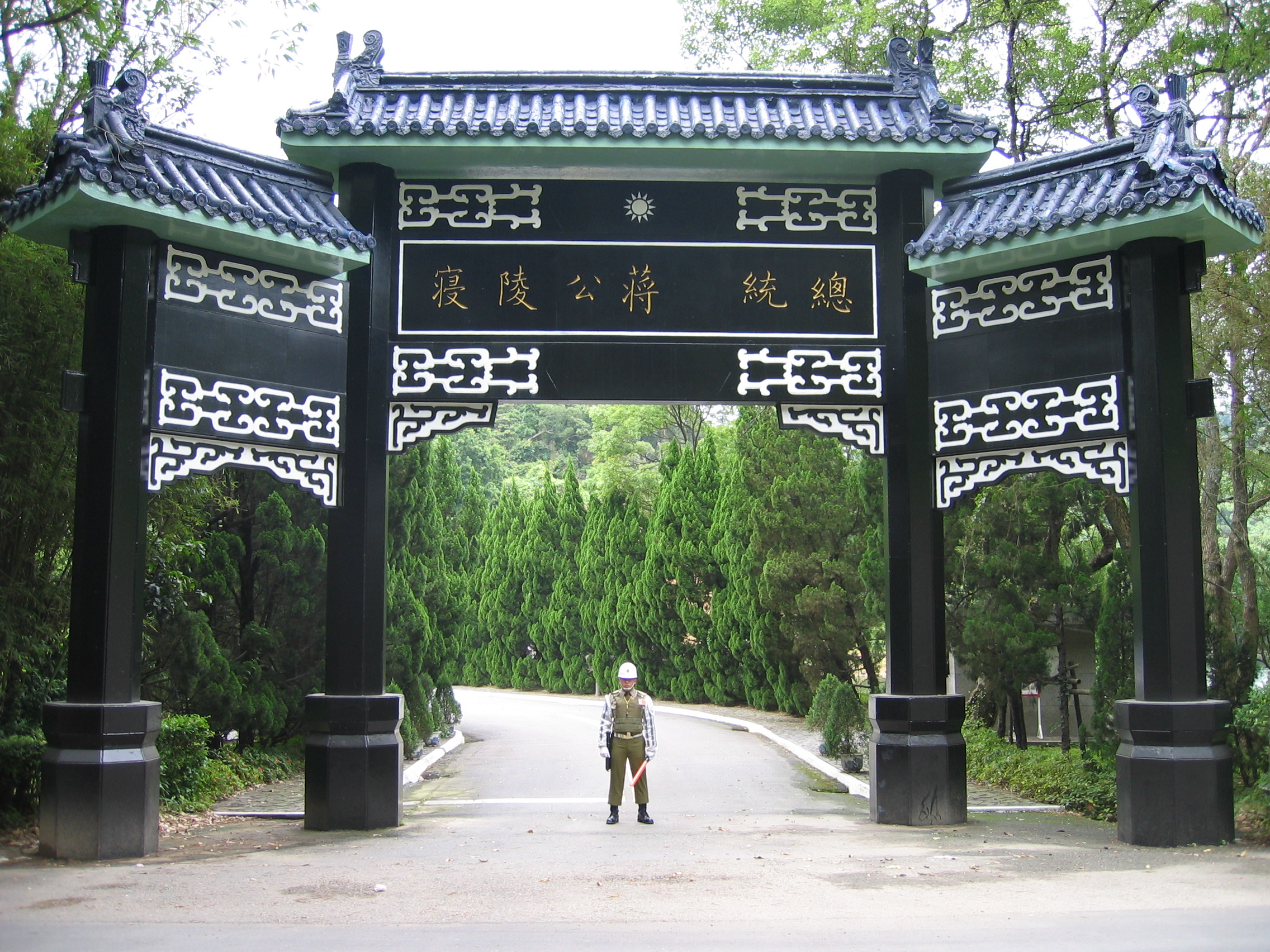 中華民國憲兵在慈湖陵寢正門值勤的衛兵。